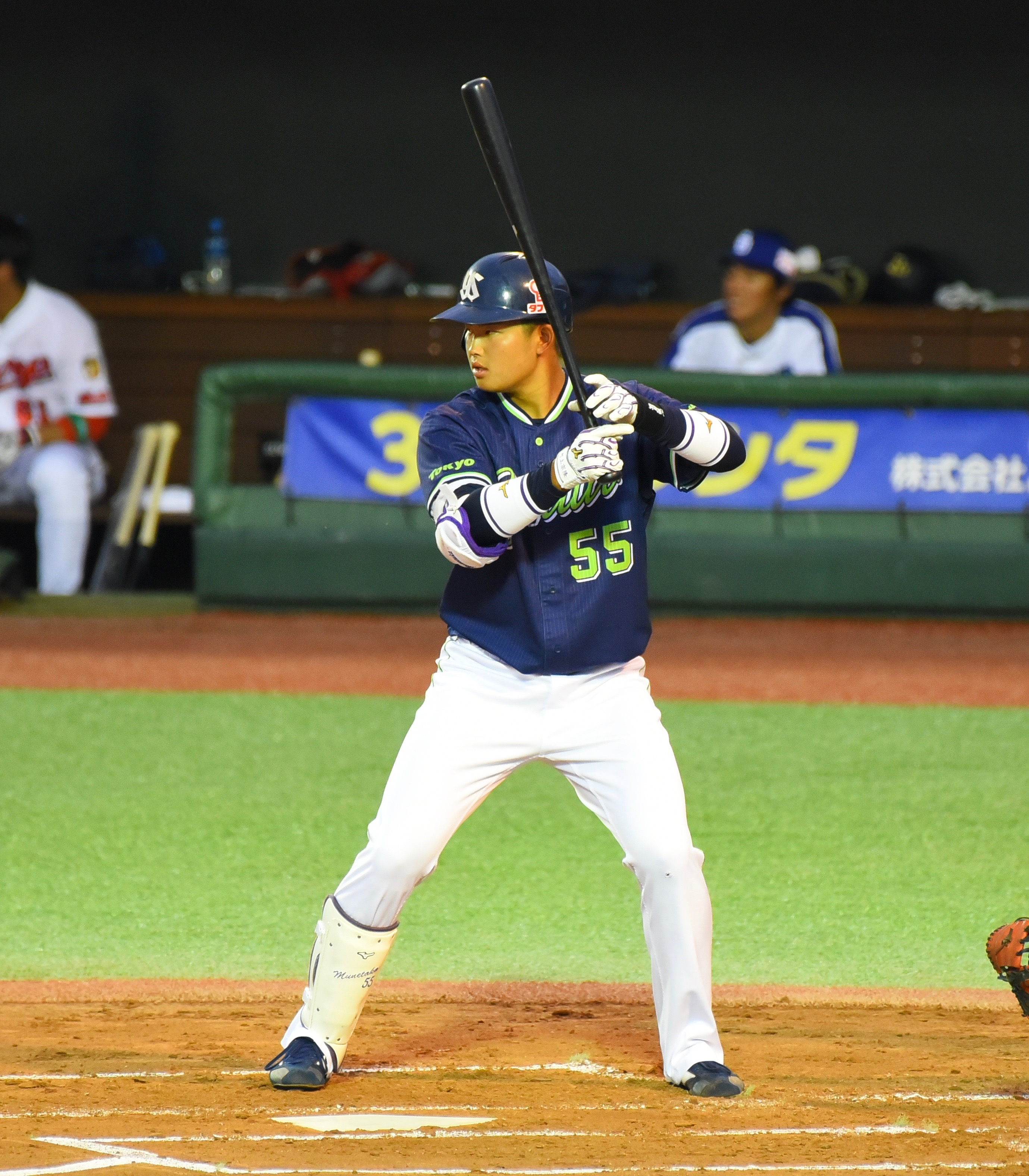 東京ヤクルトスワローズ 村上宗隆 2018年7月12日 はるか夢球場